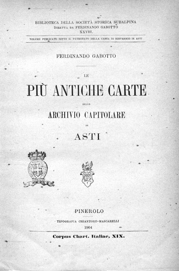 Frontespizio